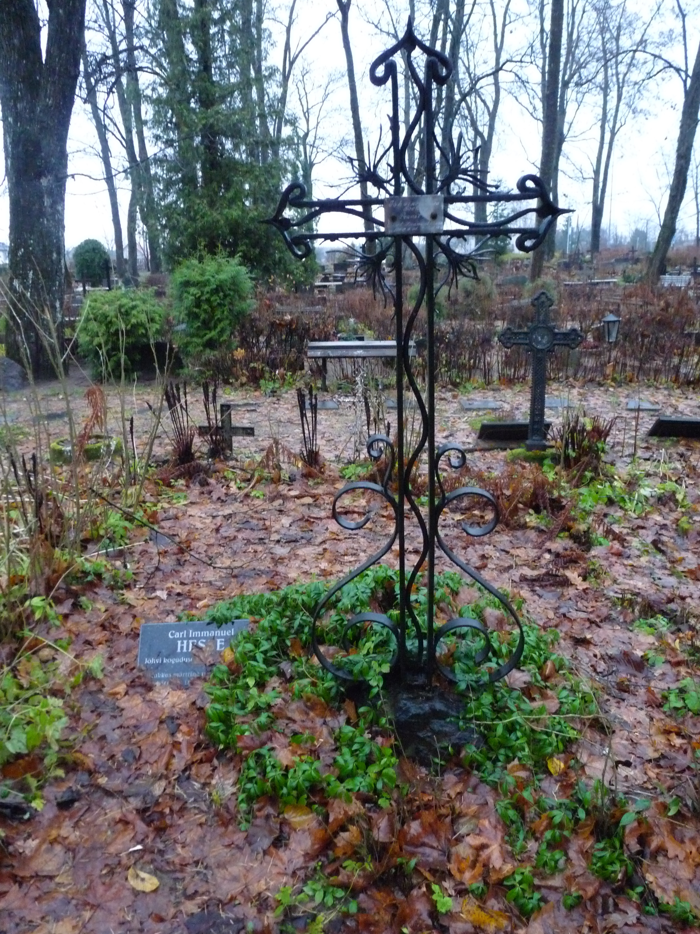 Carl Immanuel Hesse haud Jõhvi surnuaial, 4. november 2012